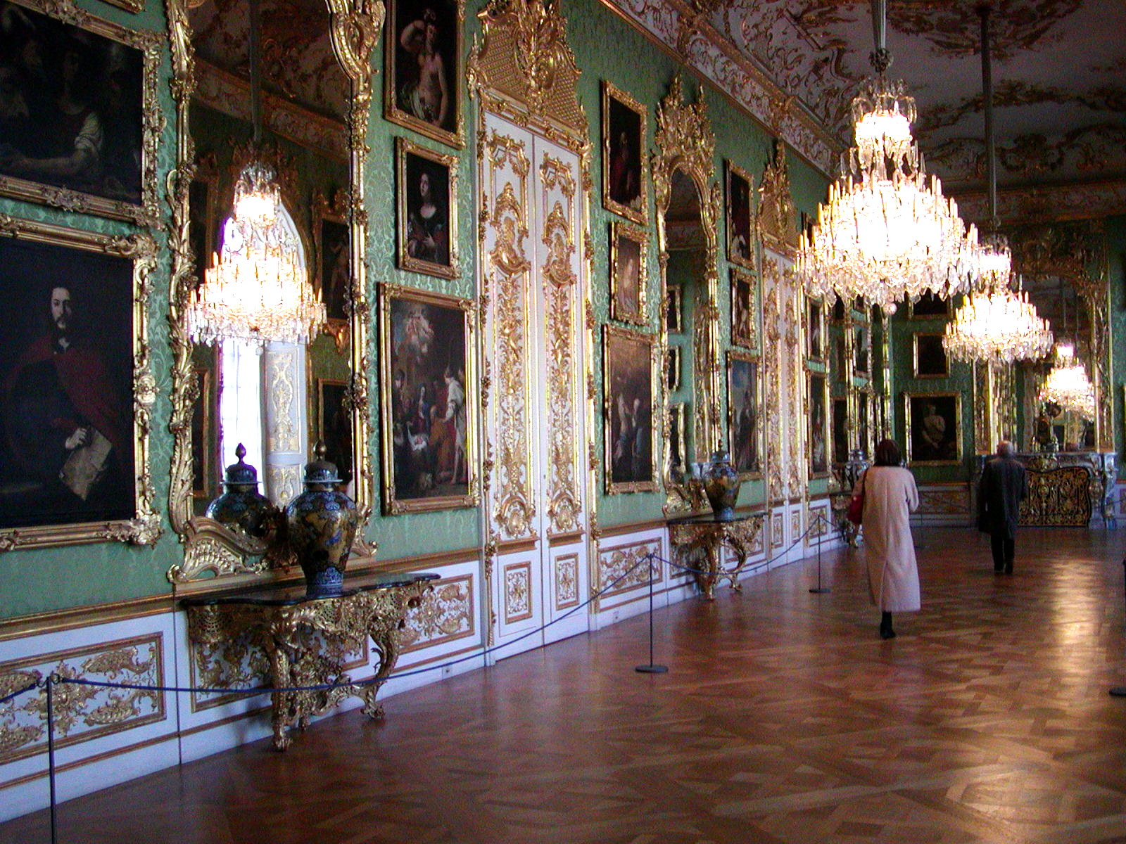 Prunkraum der Münchner Residenz (Grüne Galerie), Wand, Decke und Holzfußboden